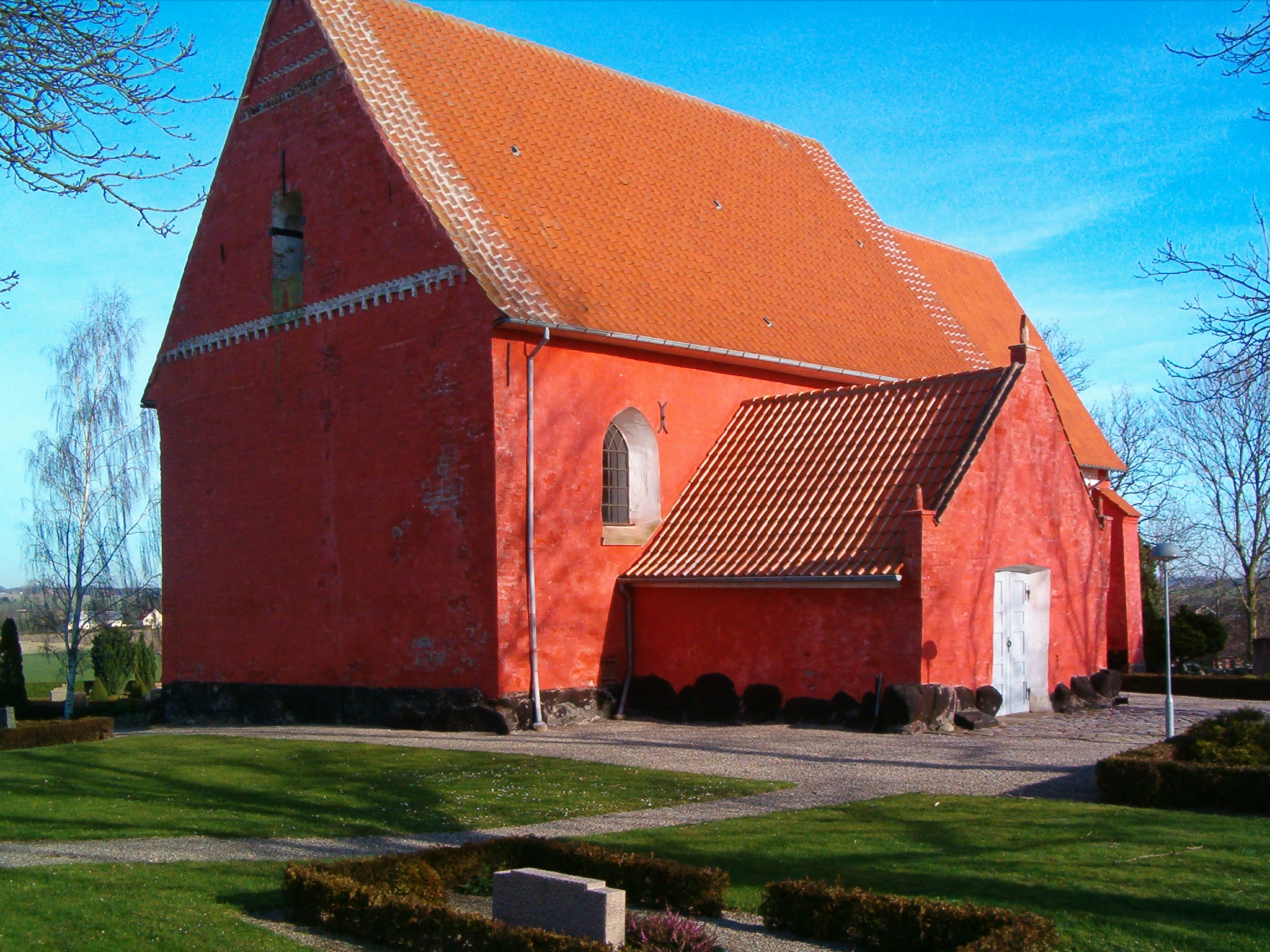 Bregninge Kirke (Guldborgsund Kommune februar 2008)